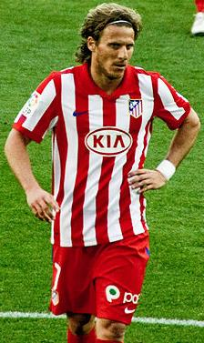 Diego Forlán, jugador del Atlético de Madrid, disputando un encuentro contra el Espanyol de Barcelona.